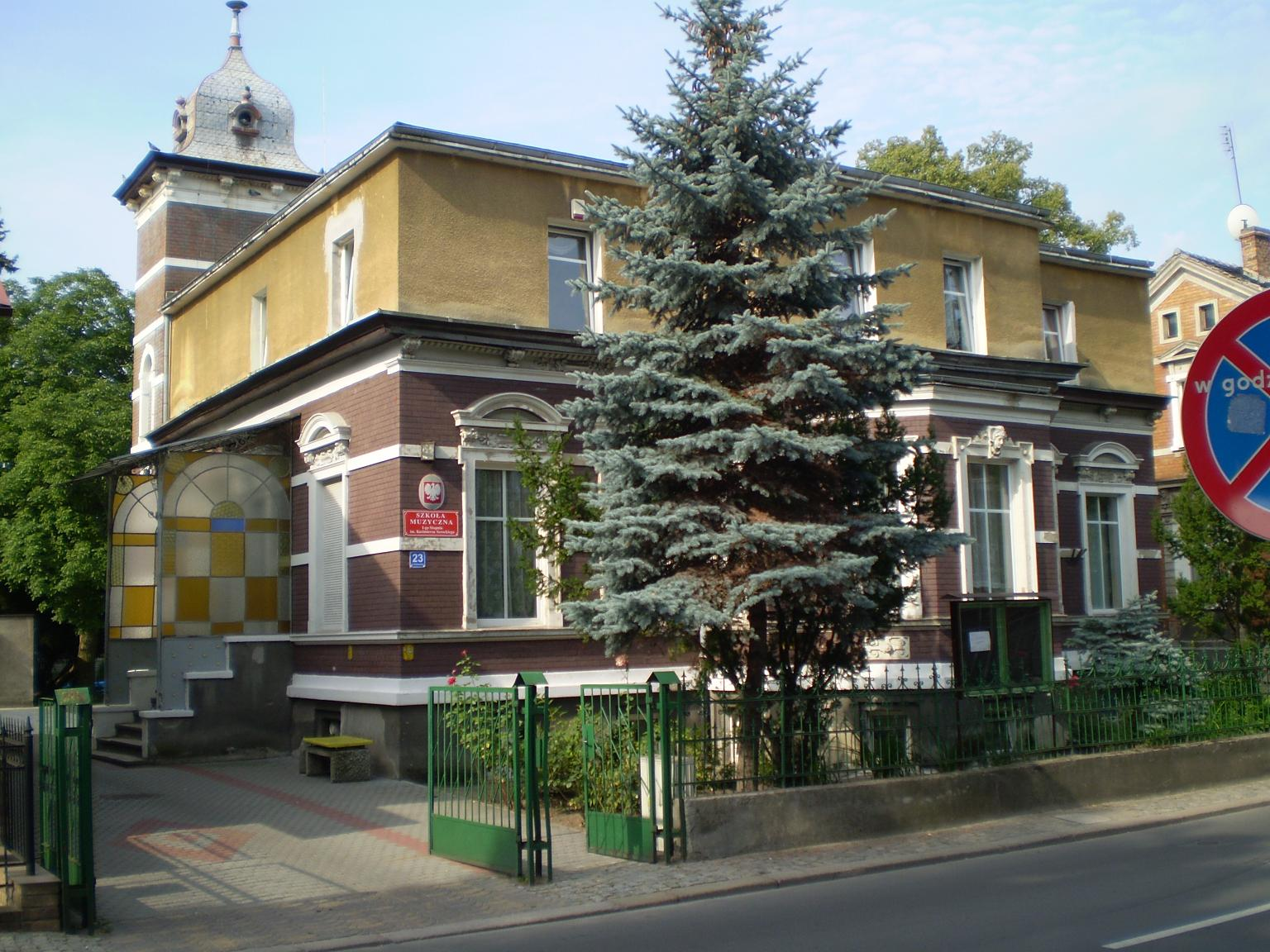 Gubin, ul. Piastowska 23 - willa, obecnie szkoła muzyczna, pocz. XX